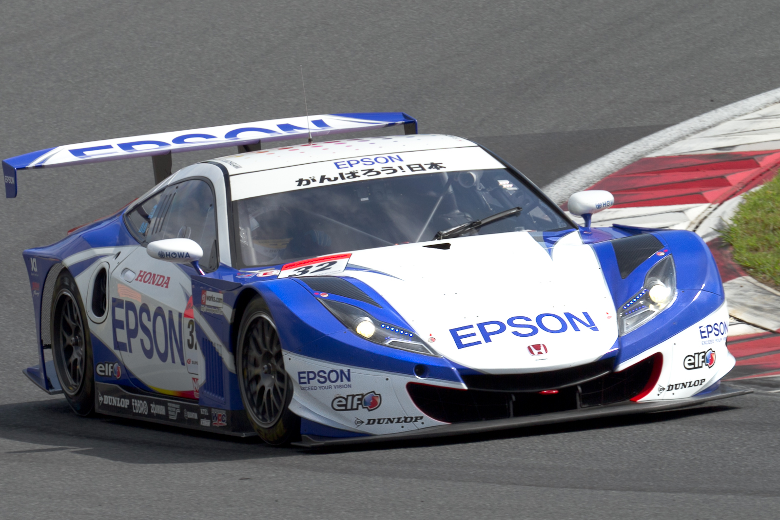 Super GT 2011 Rd.6 Fuji GT 250km: Ryo Michigami (Nakajima Racing) driving the Honda HSV-010 GT.